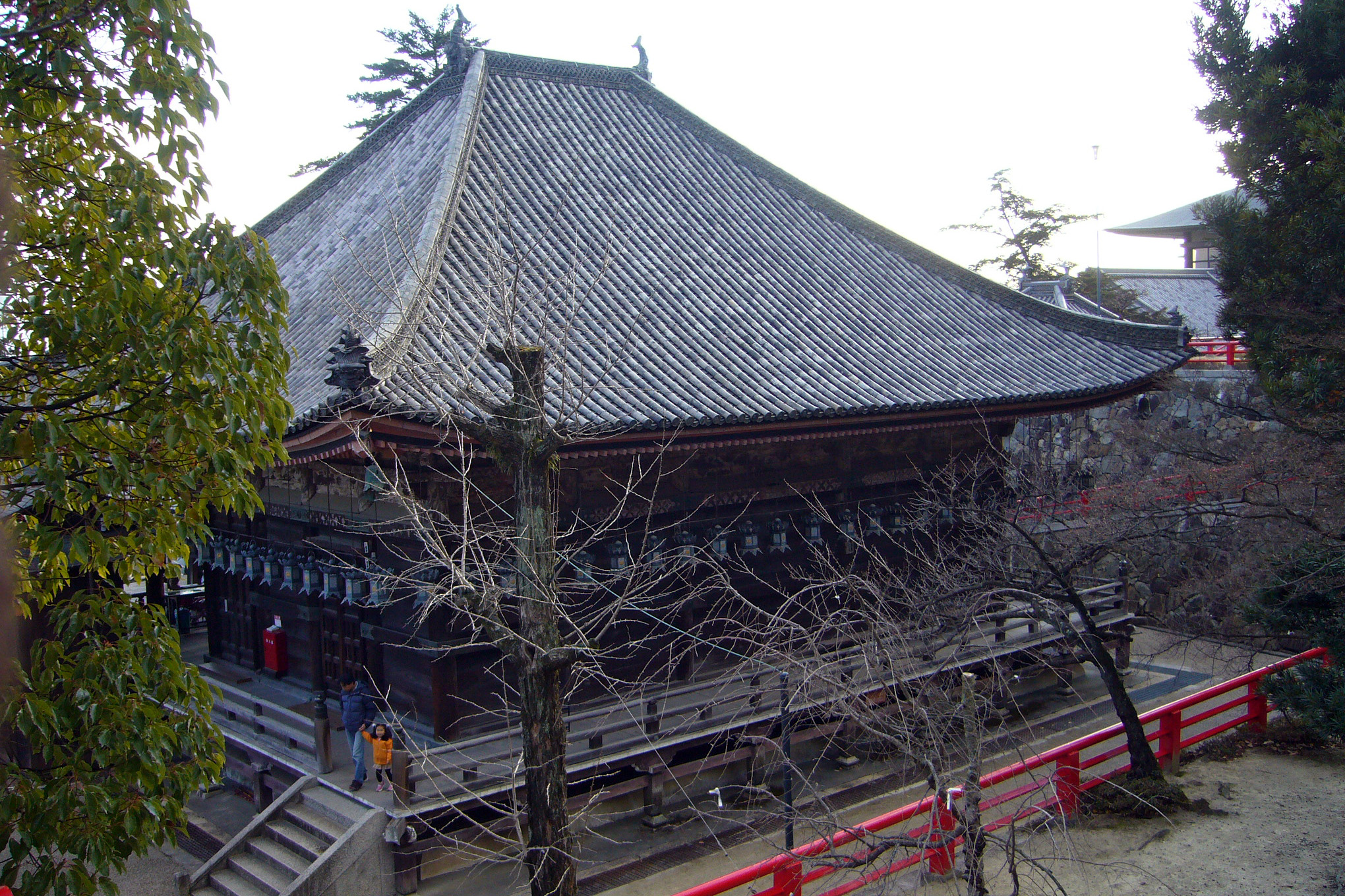 Nakayamadera in Takarazuka, Hyogo prefecture, Japan